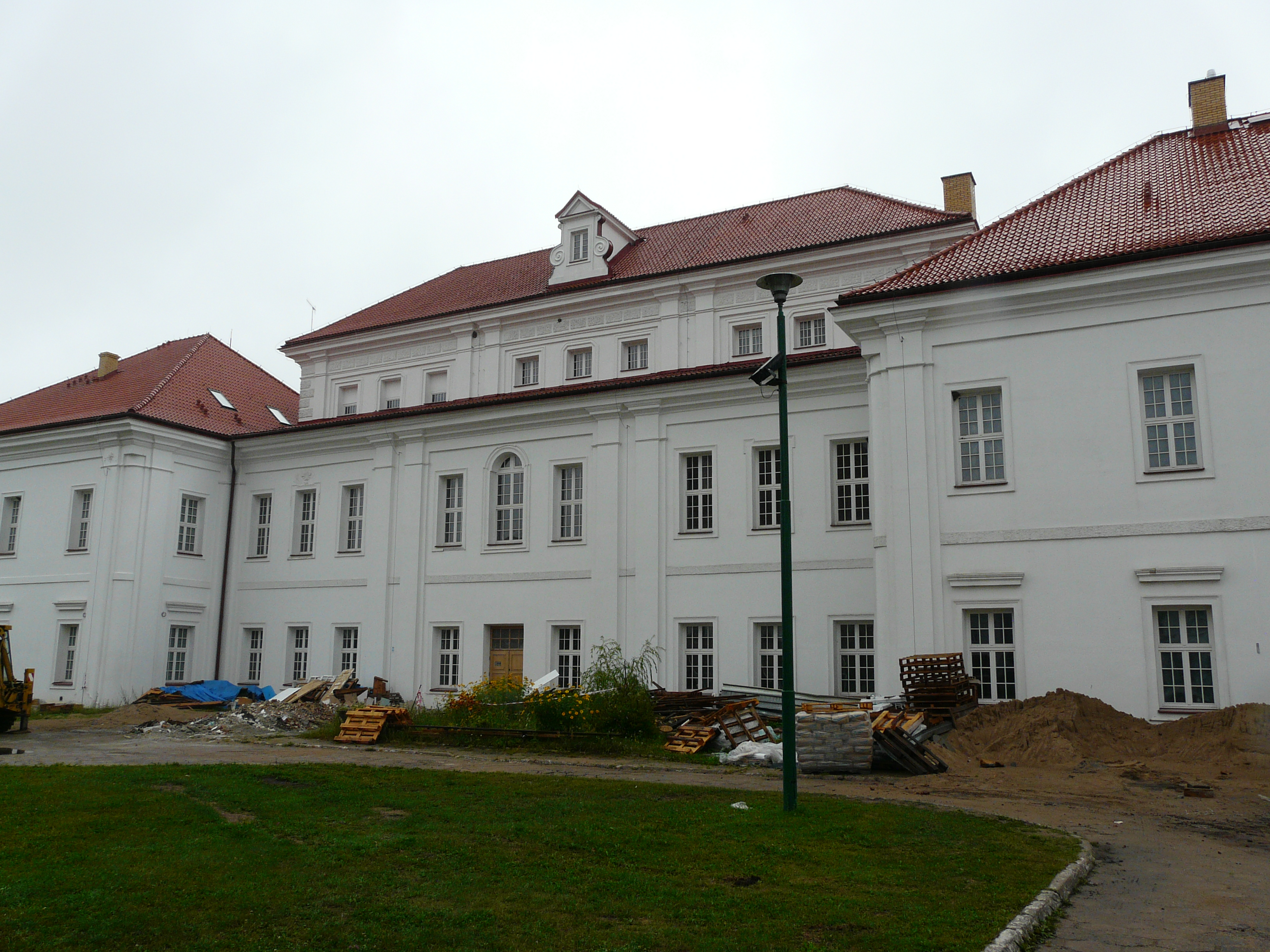 Supraśl - pałac archimandrytów (Chodkiewiczów), 1635-1655, poł. XVIII, 1959-1972